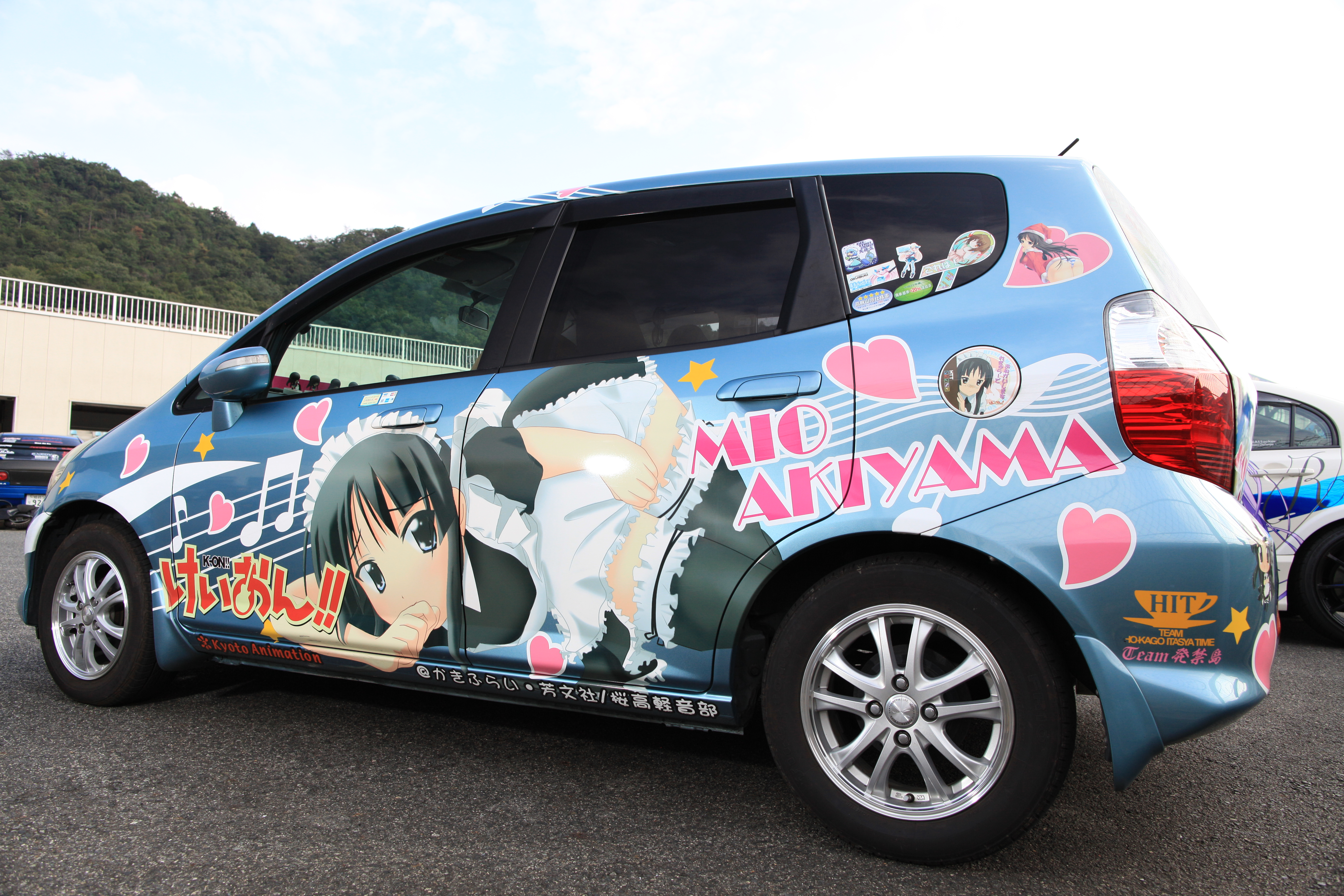 中文（台灣）: 《K-ON！輕音部》秋山澪痛車。